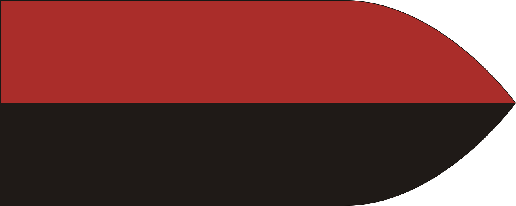 Patka w barwach saperów 4 Dywizji Piechoty Polskich Sił Zbrojnych na Zachodzie